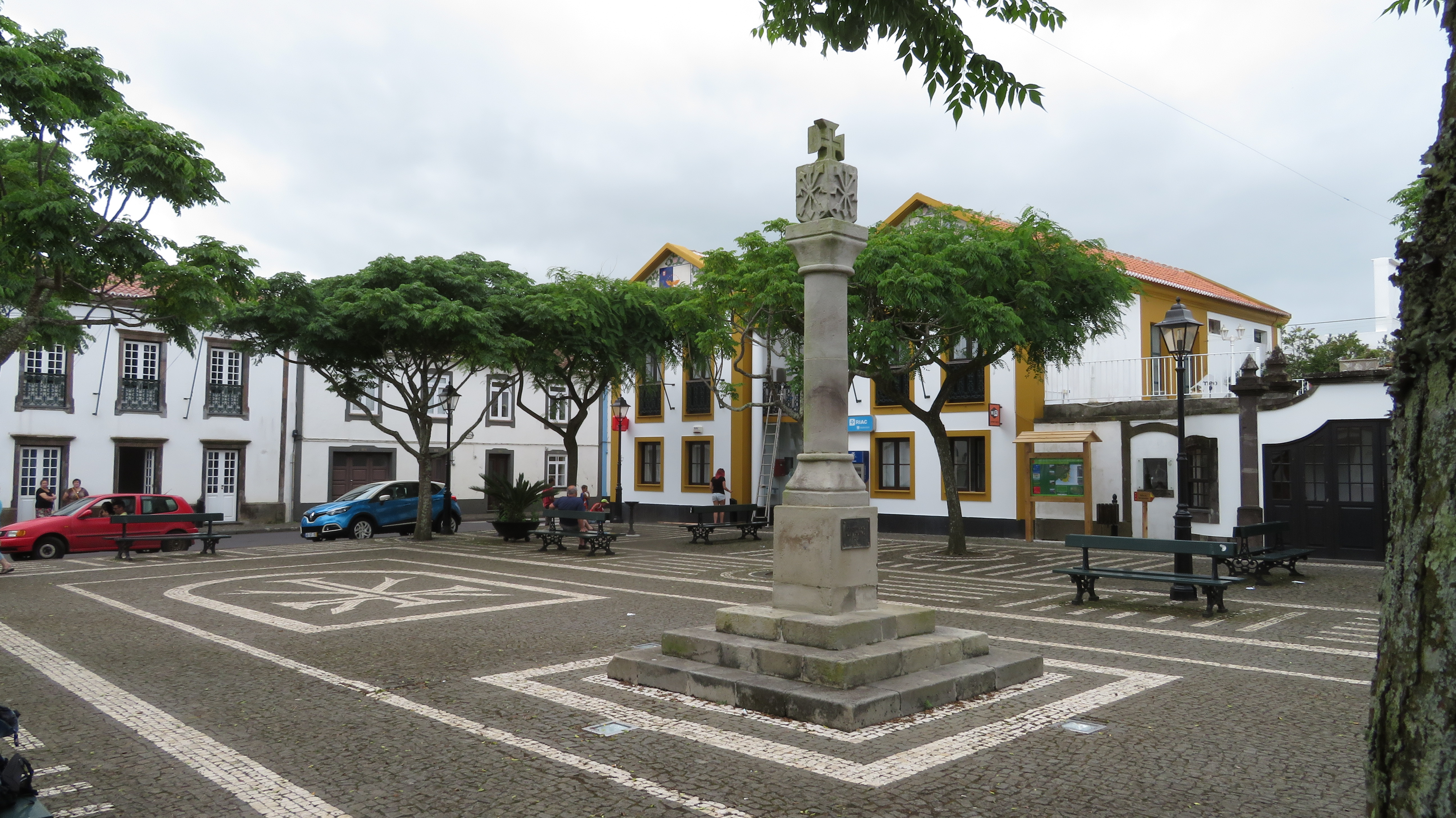 Hauptplatz mit Rathaus und Denkmal für die Seeschlacht von Salga in São Sebastião, Insel Terceira, Azoren, Portugal.